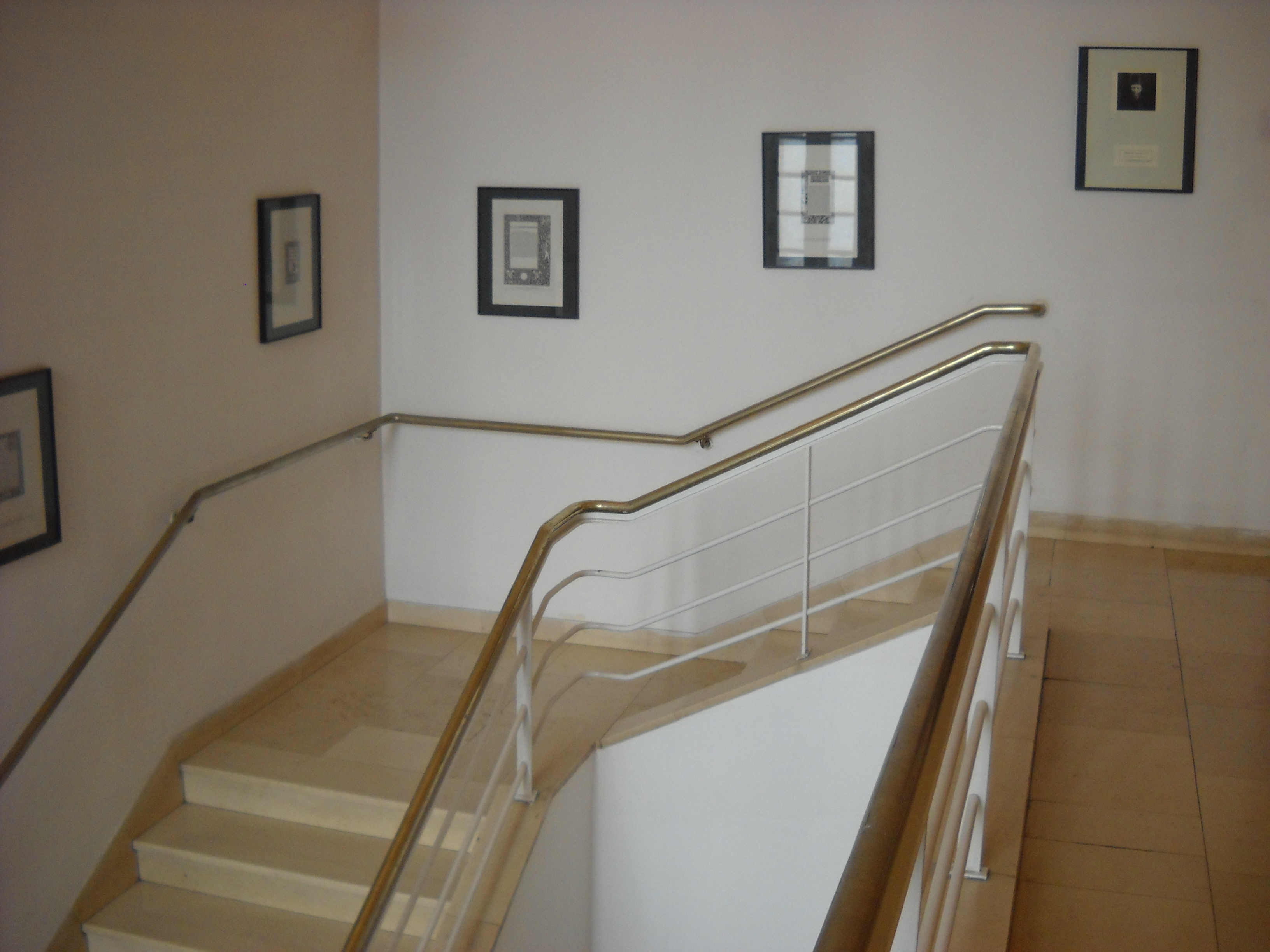 ספריית שוקן היא ספריית מחקר במדעי היהדות, על שם זלמן שוקן, השוכנת במבנה ברחוב בלפור 6 בירושלים, בין השכונות רחביה וטלביה.